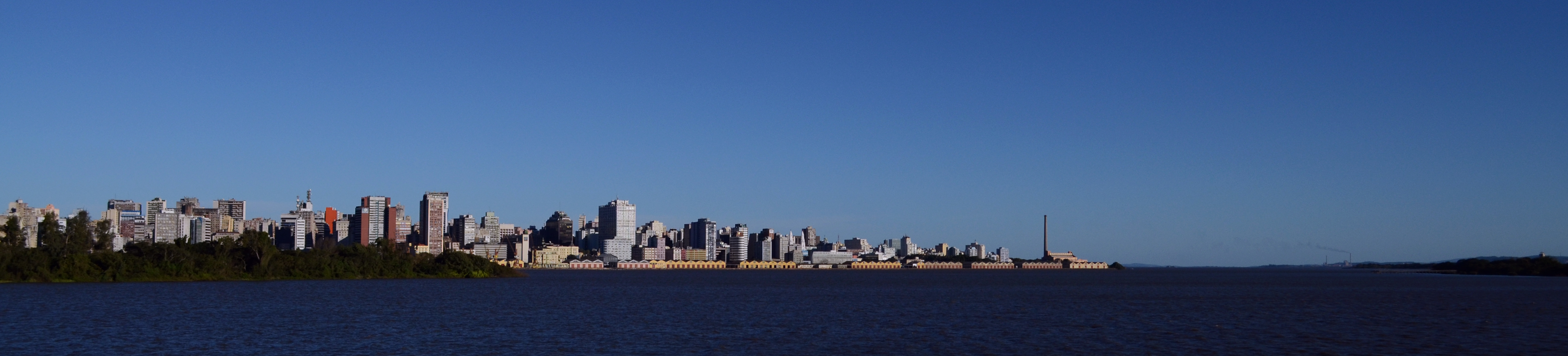 Porto Alegre